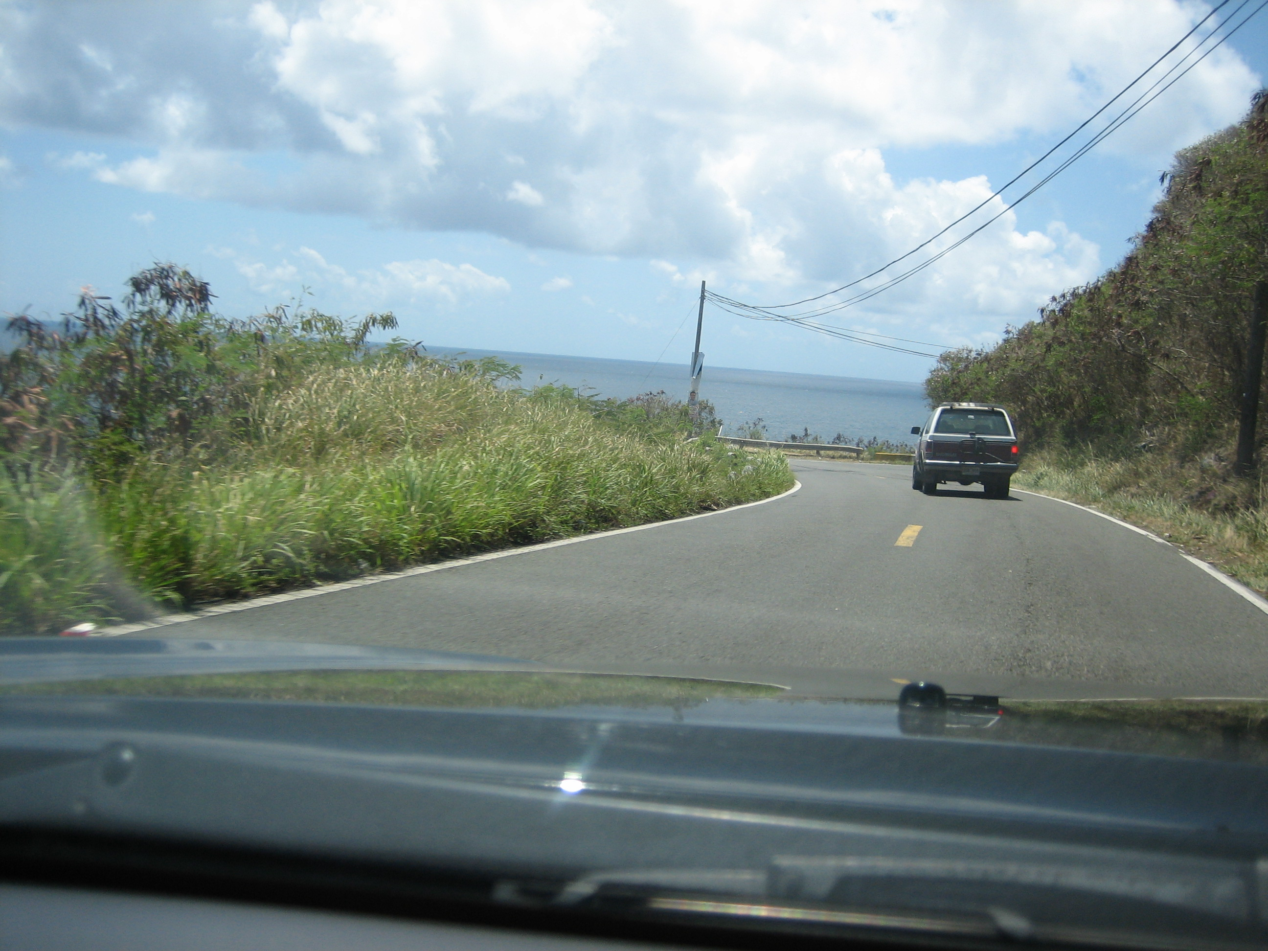 PR-3 Rural Patillas